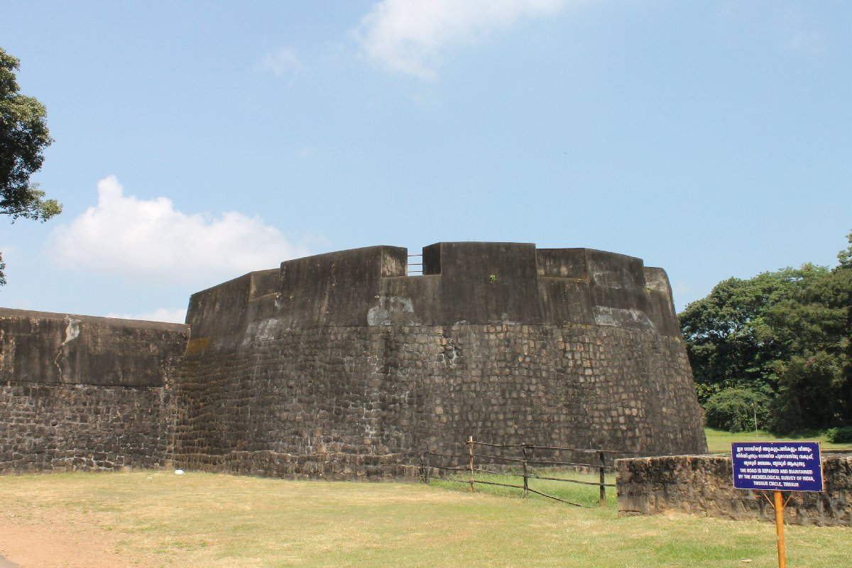 പാലക്കാട് കോട്ട - പുറമെ നിന്നുള്ള ദൃശ്യം